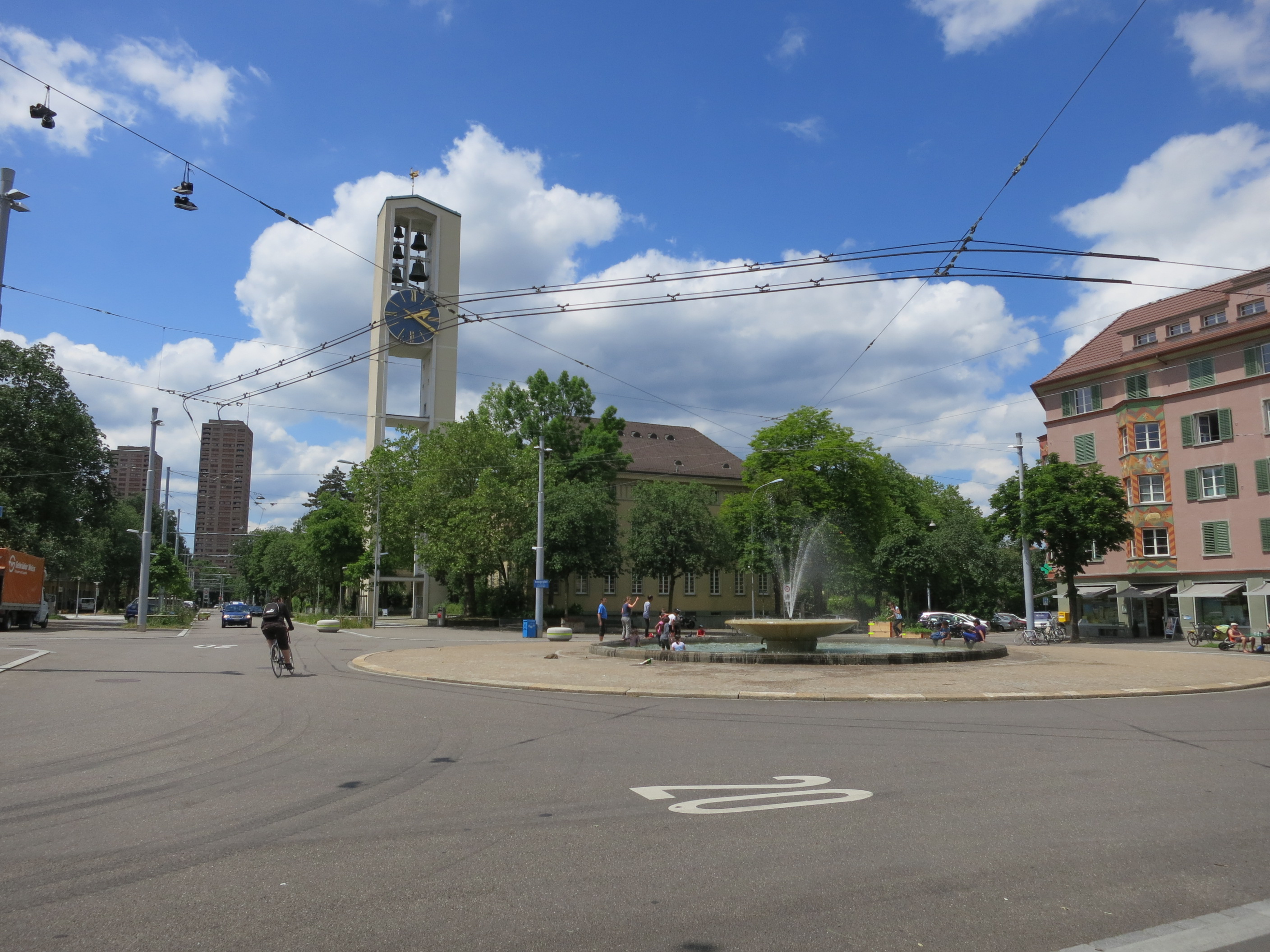 Bullingerplatz, Zürich-Hard, Schweiz